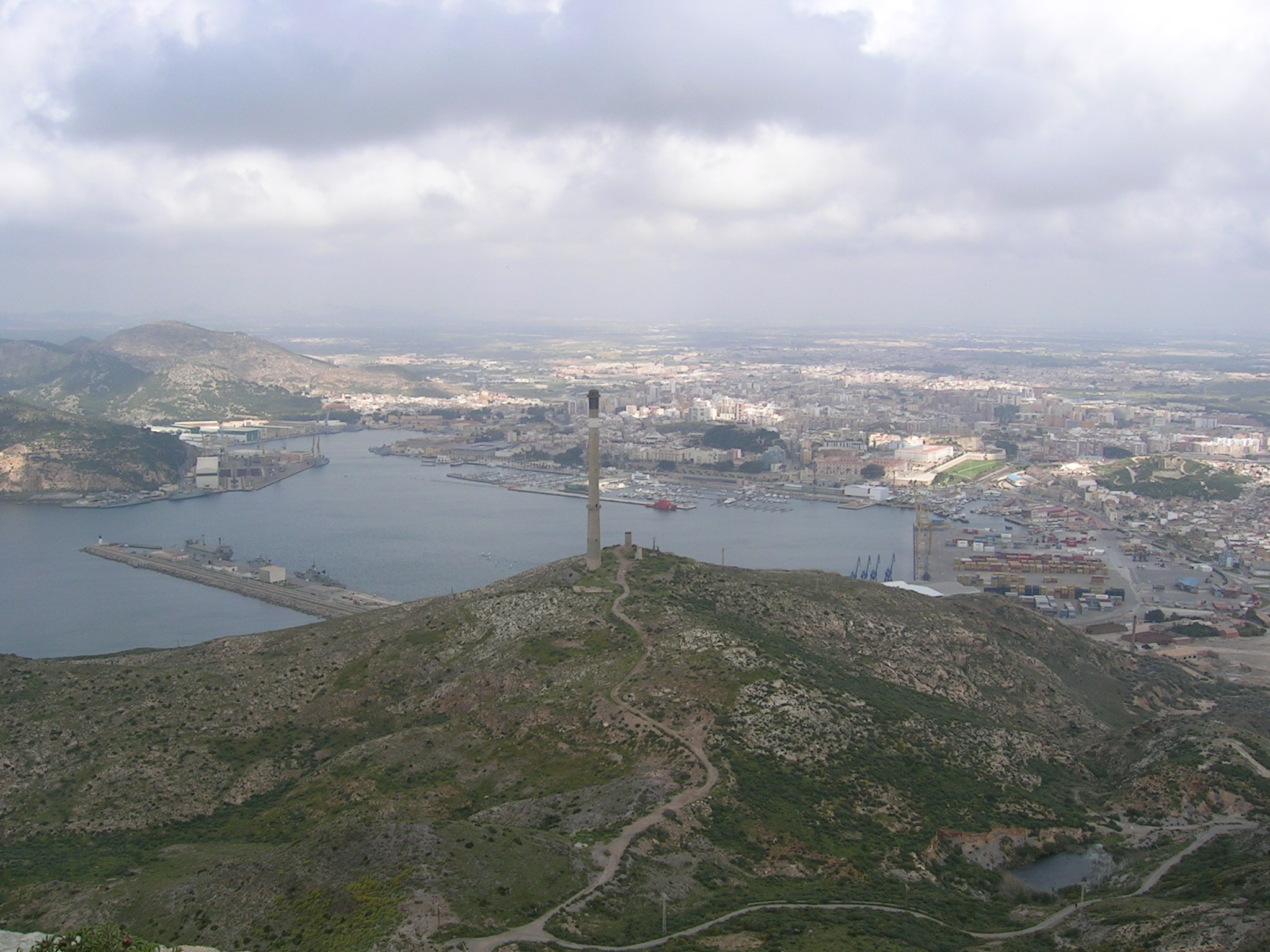 Vista de Cartagena desde San Julián